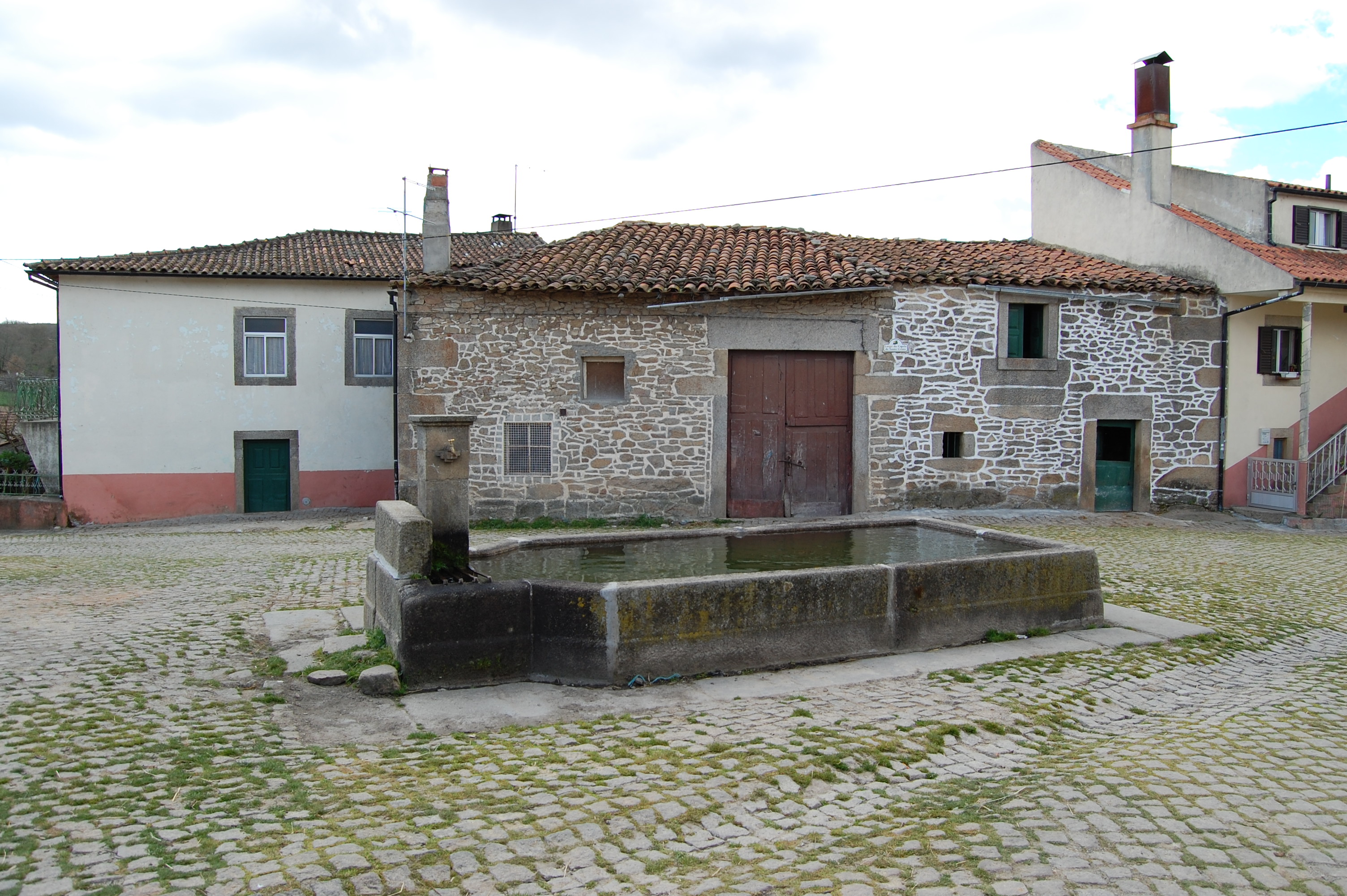 Caçarelhos.